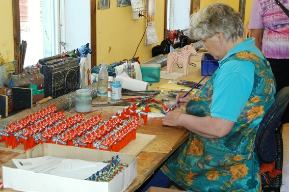 Die feinen Saummuster werden von Hand aufgemalt